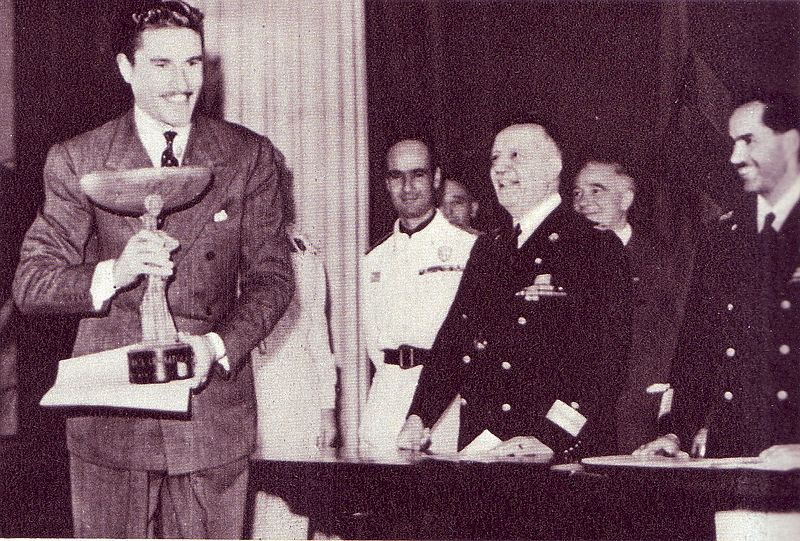 Premiazione coppa del Ministero Cultura per Caravaggio 1941